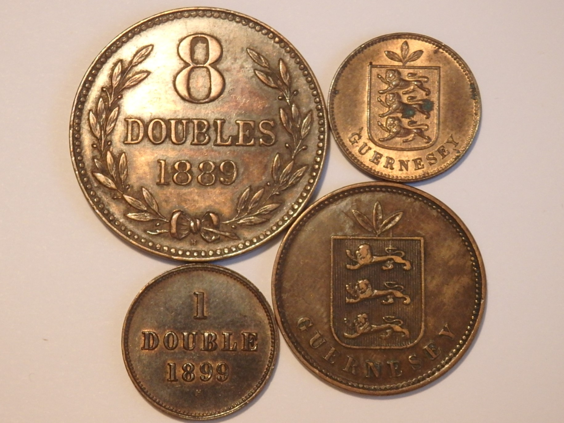 8, 4 und zwei 1 Doublesmünzen von Guernsey von 1864 bis 1899